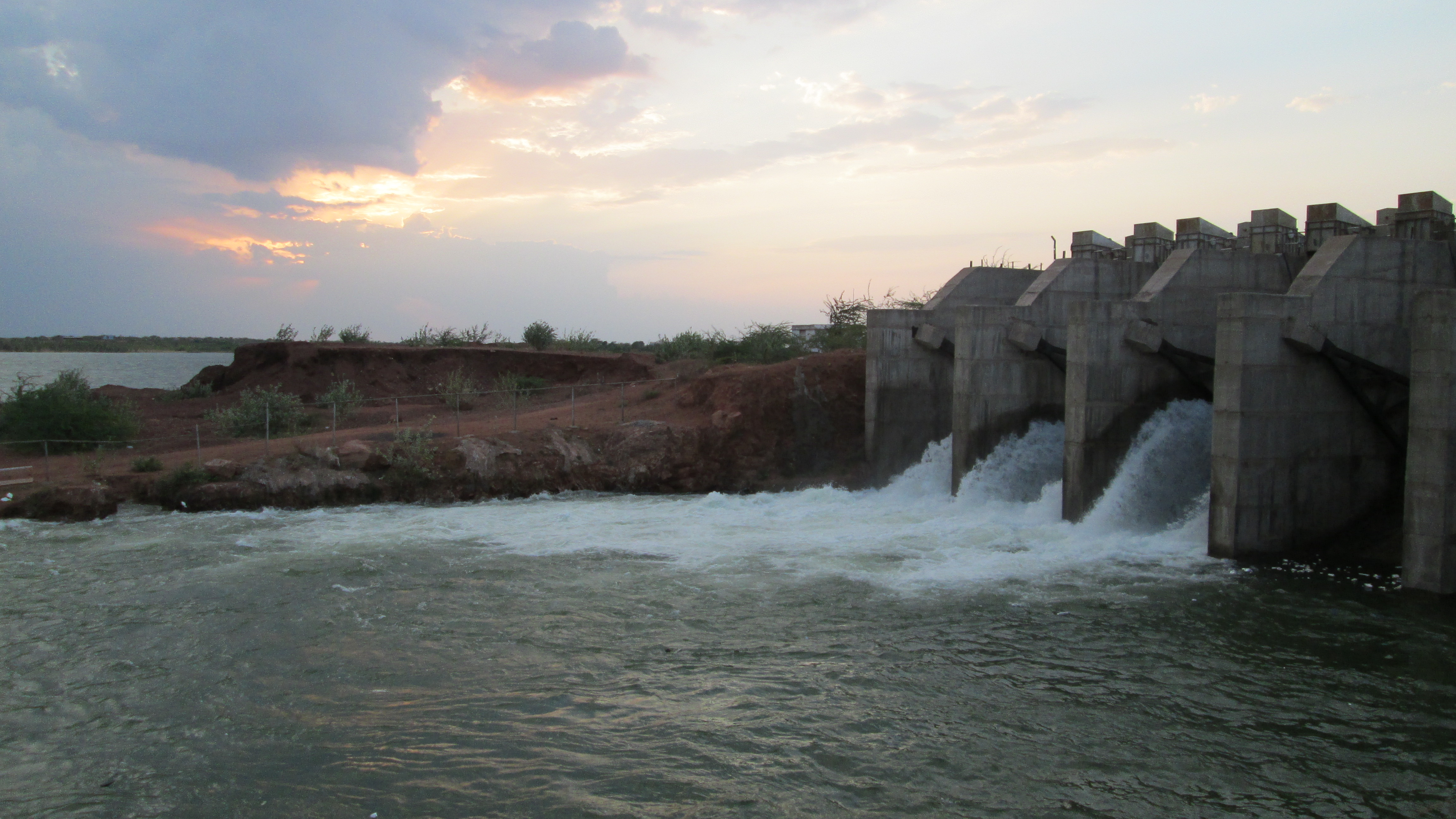 Dholi Dhaja Dam Gate